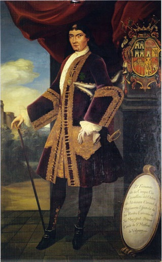 Fernando de la Campa y Cos, I Conde de San Mateo de Valparaiso